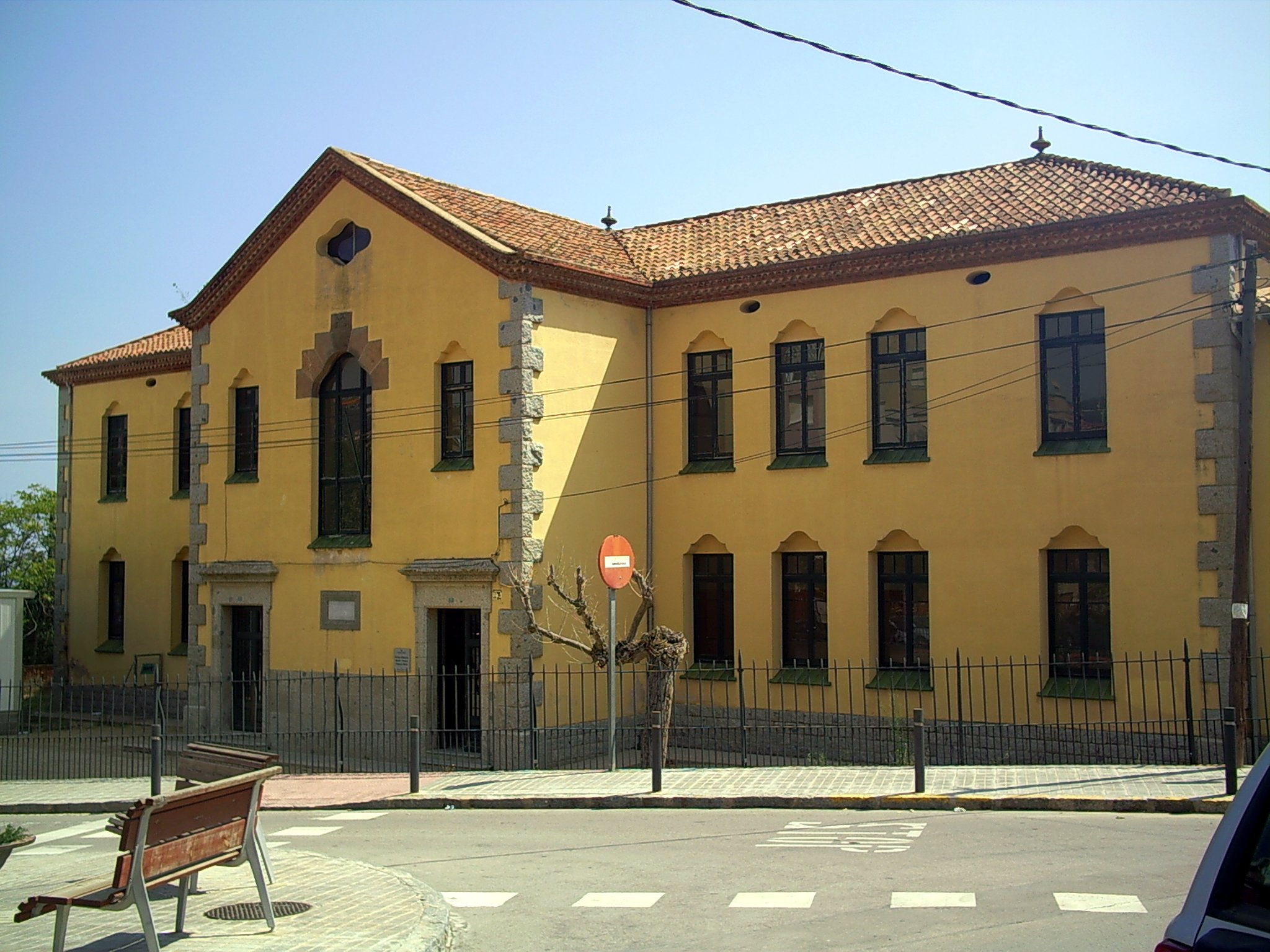 CEIP Francesc Macià, edifici del Cicle Inicial, obra de Jeroni Martorell Terrats. a Vilassar de Dalt, comarca del Maresme, Catalunya.